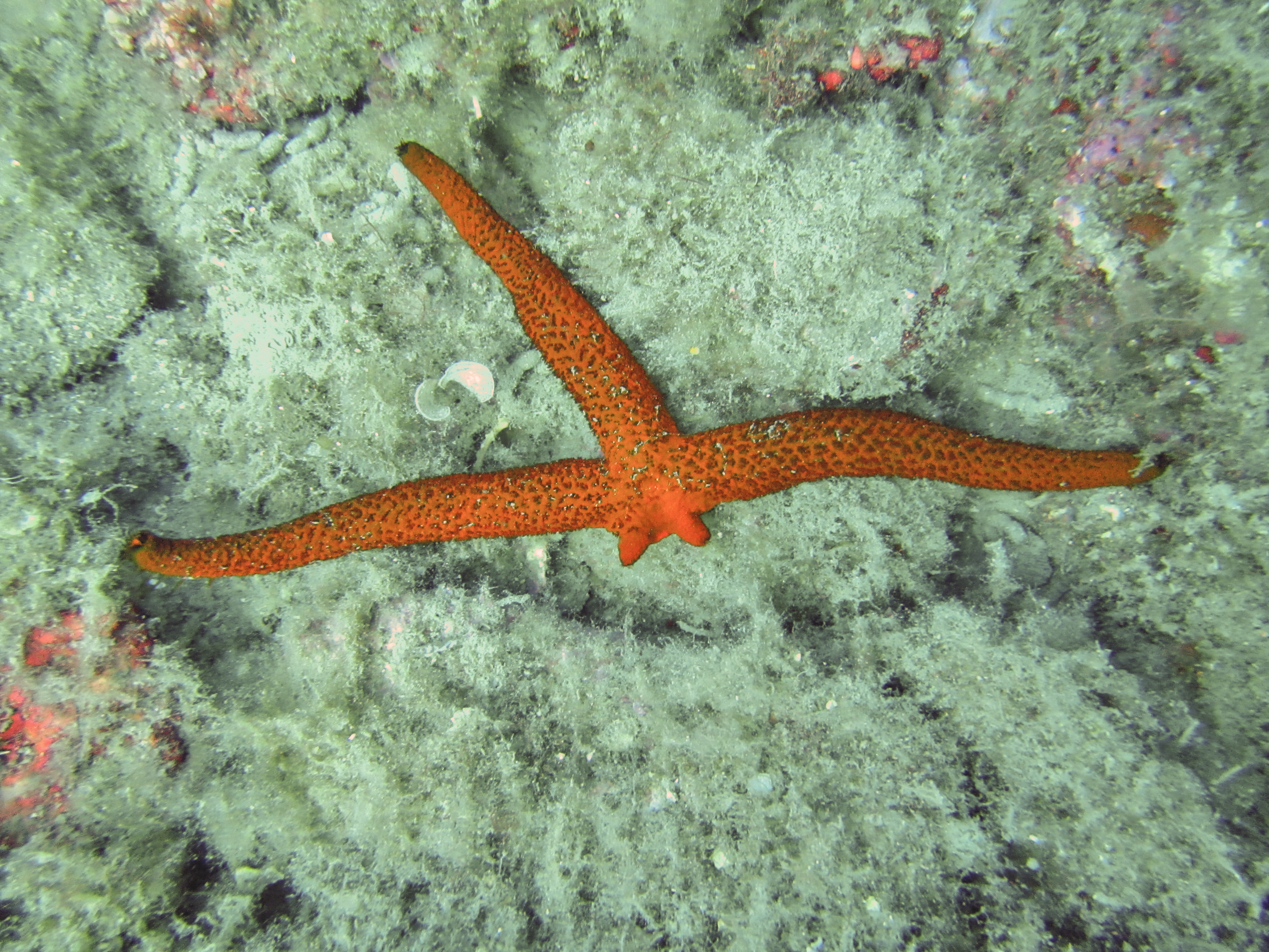 L'étoile de mer rouge méditerranéenne Echinaster sepositus, en train de régénérer deux bras perdus, à Banyuls-sur-Mer.